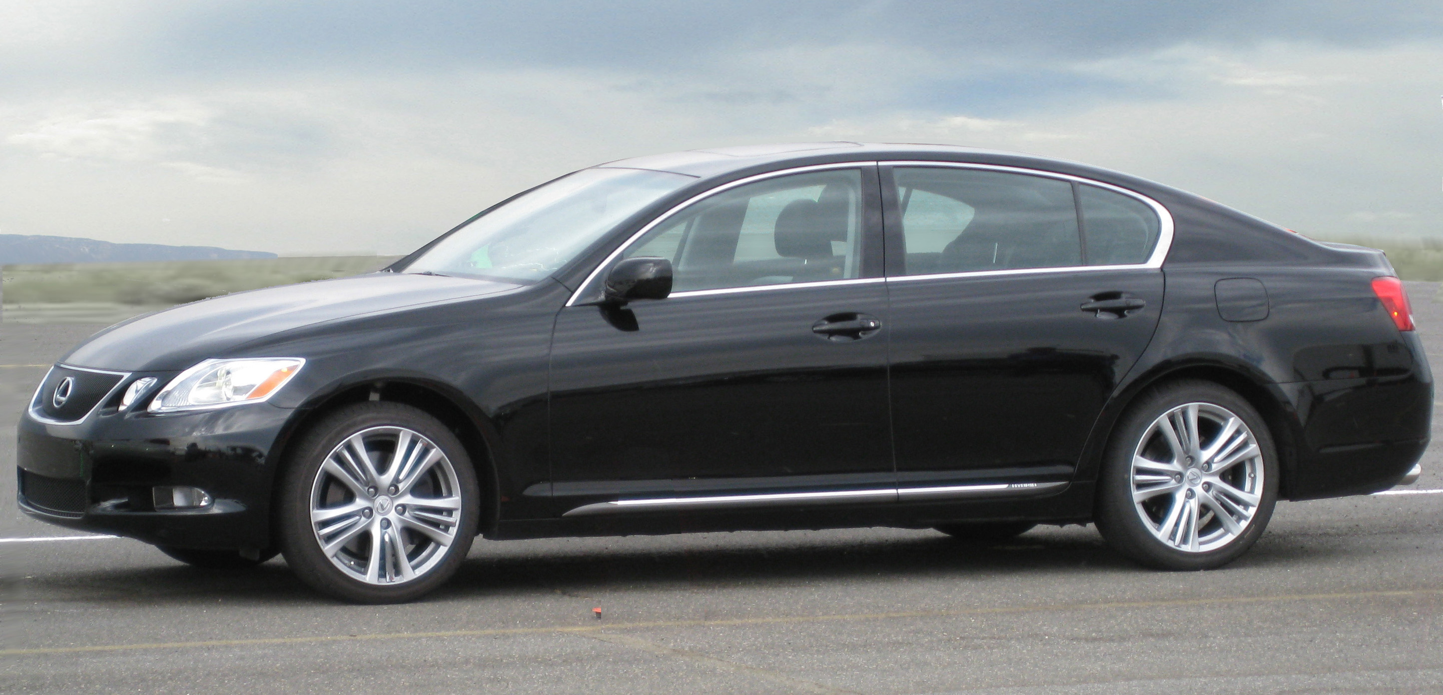 Lexus GS 450h